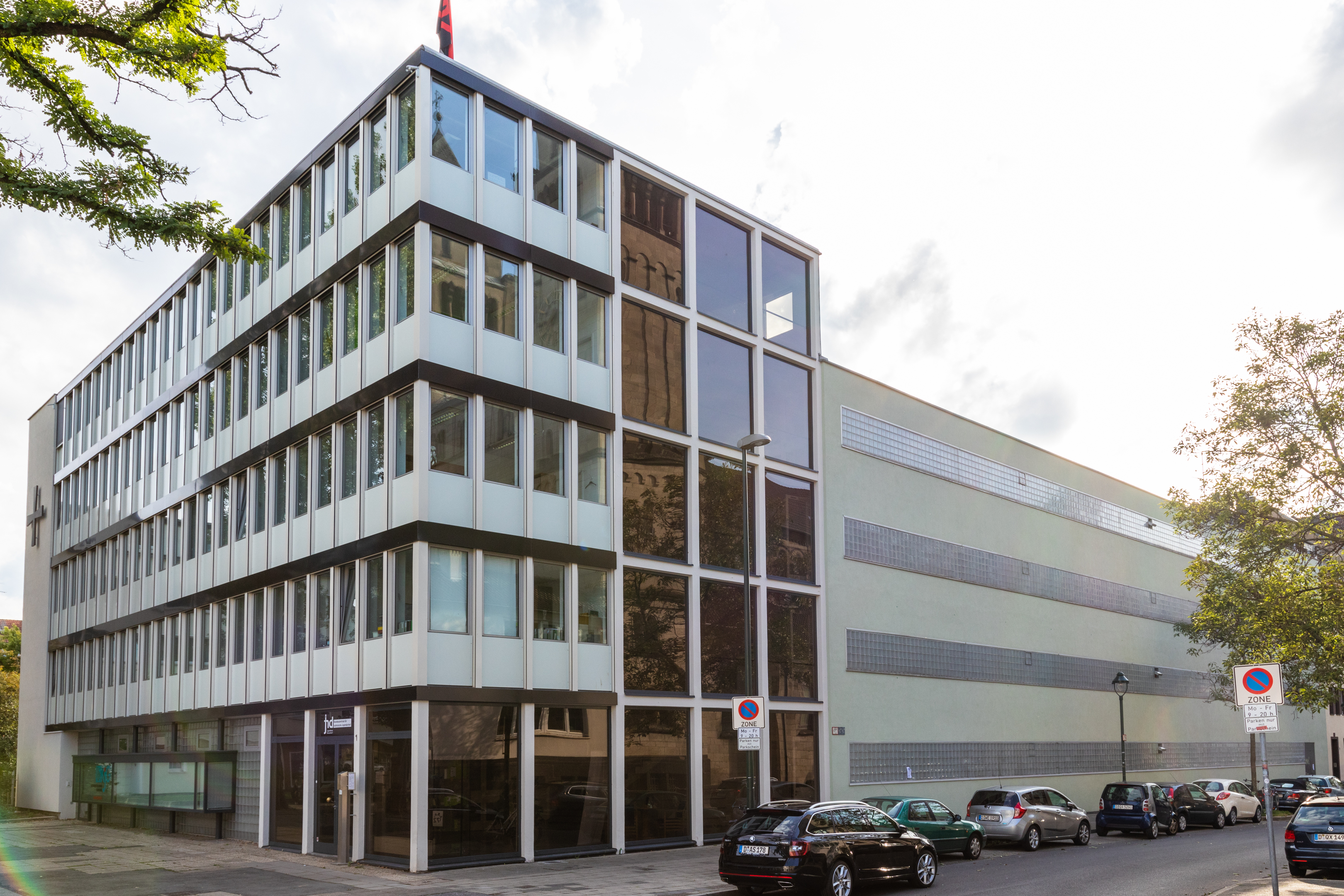 Carl-Mosterts-Platz 1 , DüsseldorfThis is a photograph of an architectural monument., no. A 1238